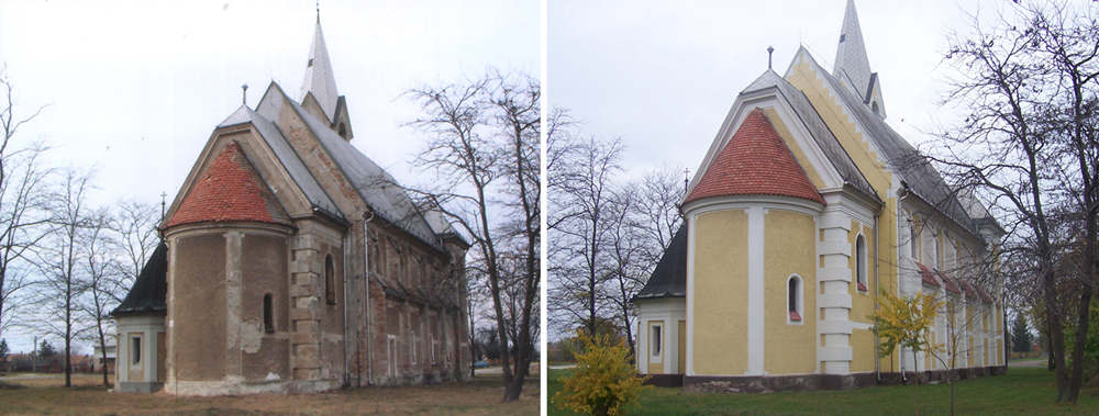 Magyarok Nagyasszonya templom felújítás előtt és után, Besnyő